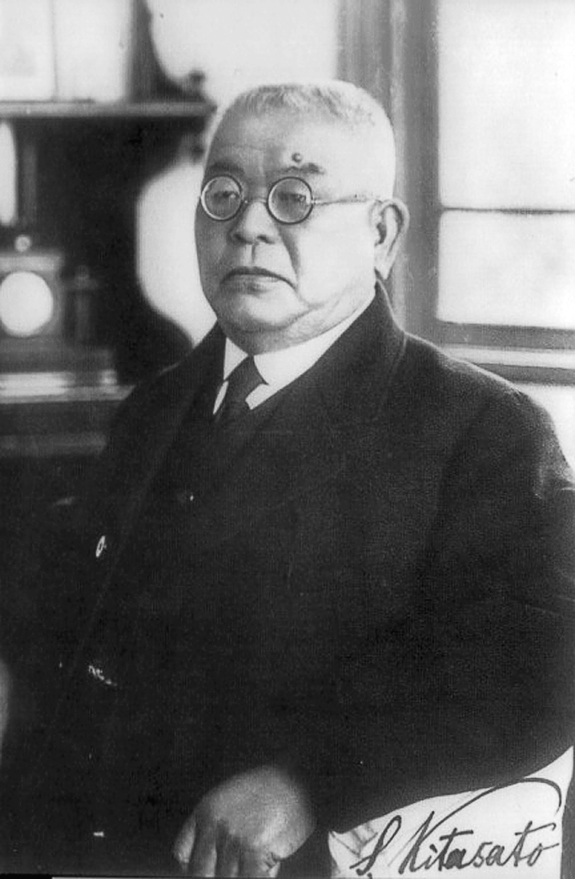 Kitasato Shibasaburo（北里柴三郎）, Japanese bacteriologist